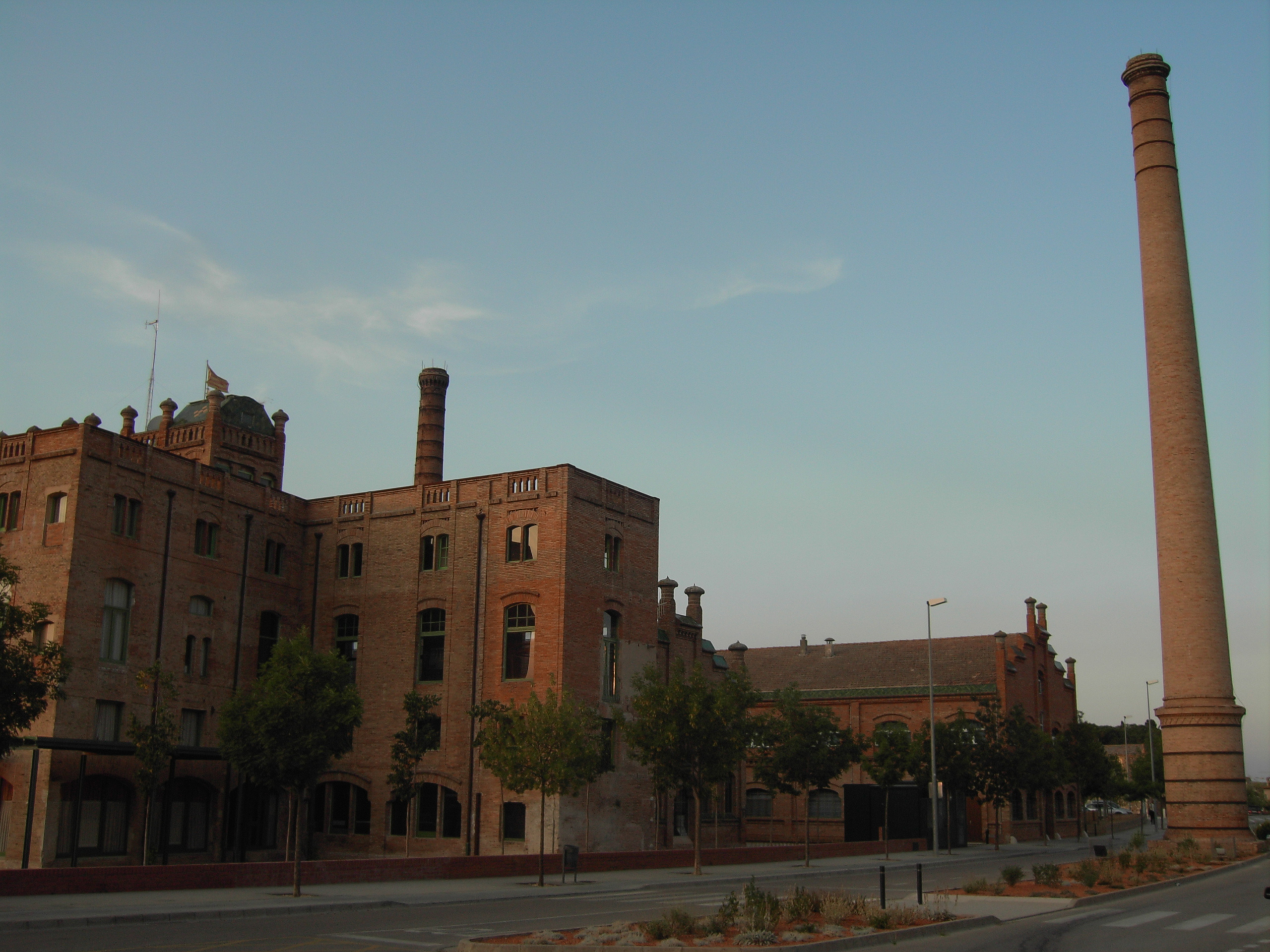 La Fàbrica, Celrà - Catalonia